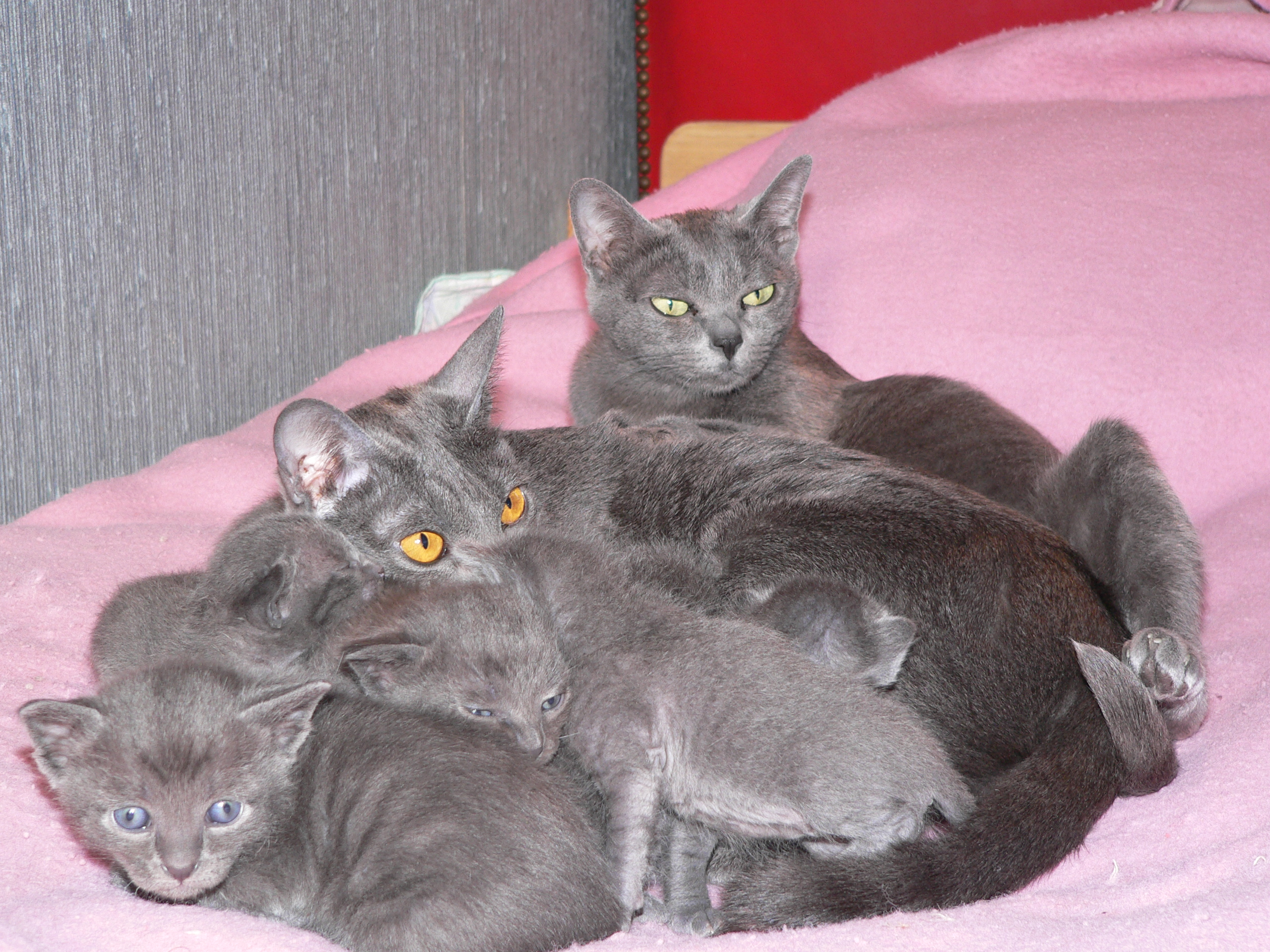 Famille de chats de race Korat : à quelques jours les yeux sont bleus, à quelques mois ils sont ambres, puis ils deviennent verts pastel et ne varient plus. Auteur : Max BOUCHE pour le KORAT CLUB DE FRANCE. Photo de 2,21 Mo du 19/03/2005 de 2560 x 1920 pixels prise avec un DMC-FZ20 (lentille Leica)